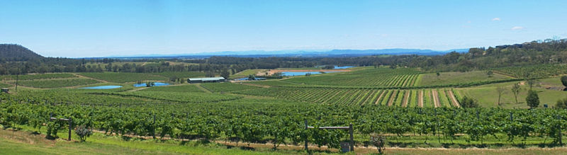 Vue panoramique de vignobles dans la vallée Hunter